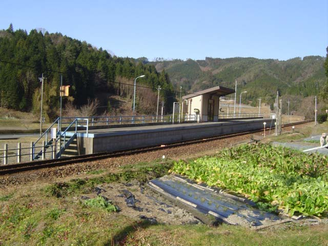 明知鉄道野志駅 投稿者が撮影（2004年12月22日）